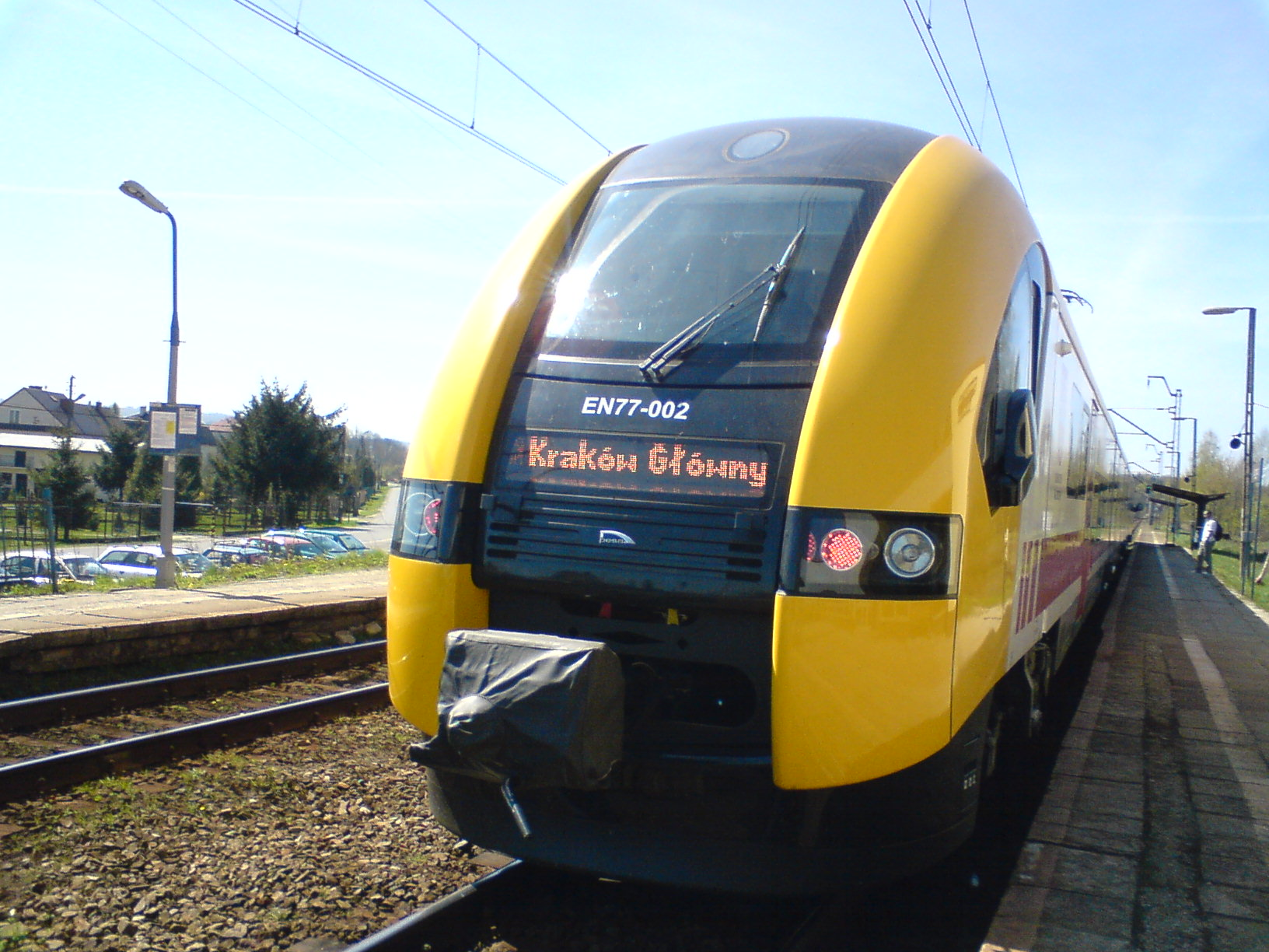 Sterkowiec, Polska